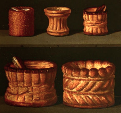 Planche de "Croustades", p.58, Le livre de pâtisserie de Jules Gouffé (1873)